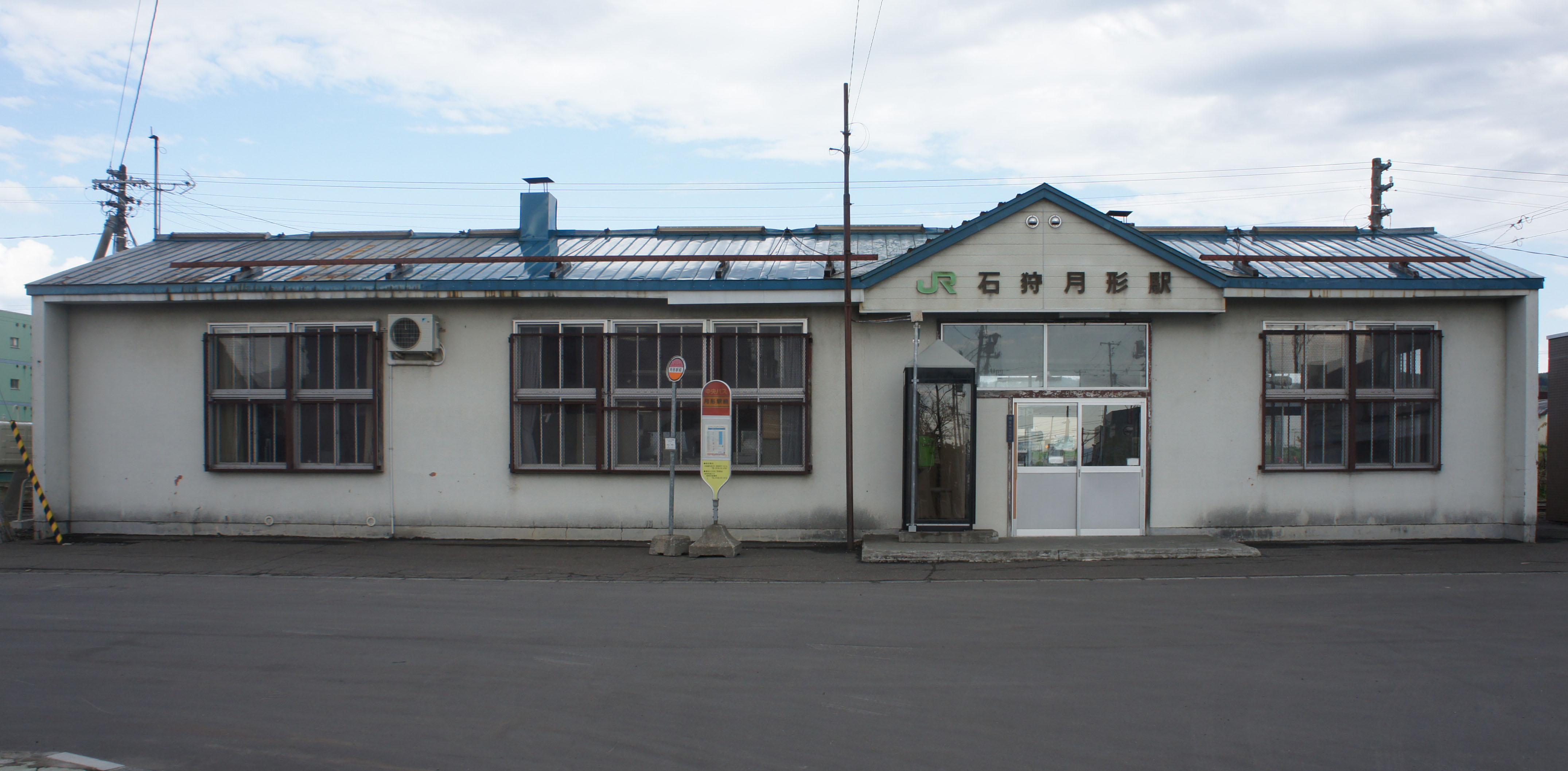 JR札沼線・石狩月形駅の駅舎